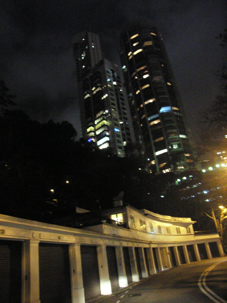 May Road, Hong Kong (by Fenleckdo).